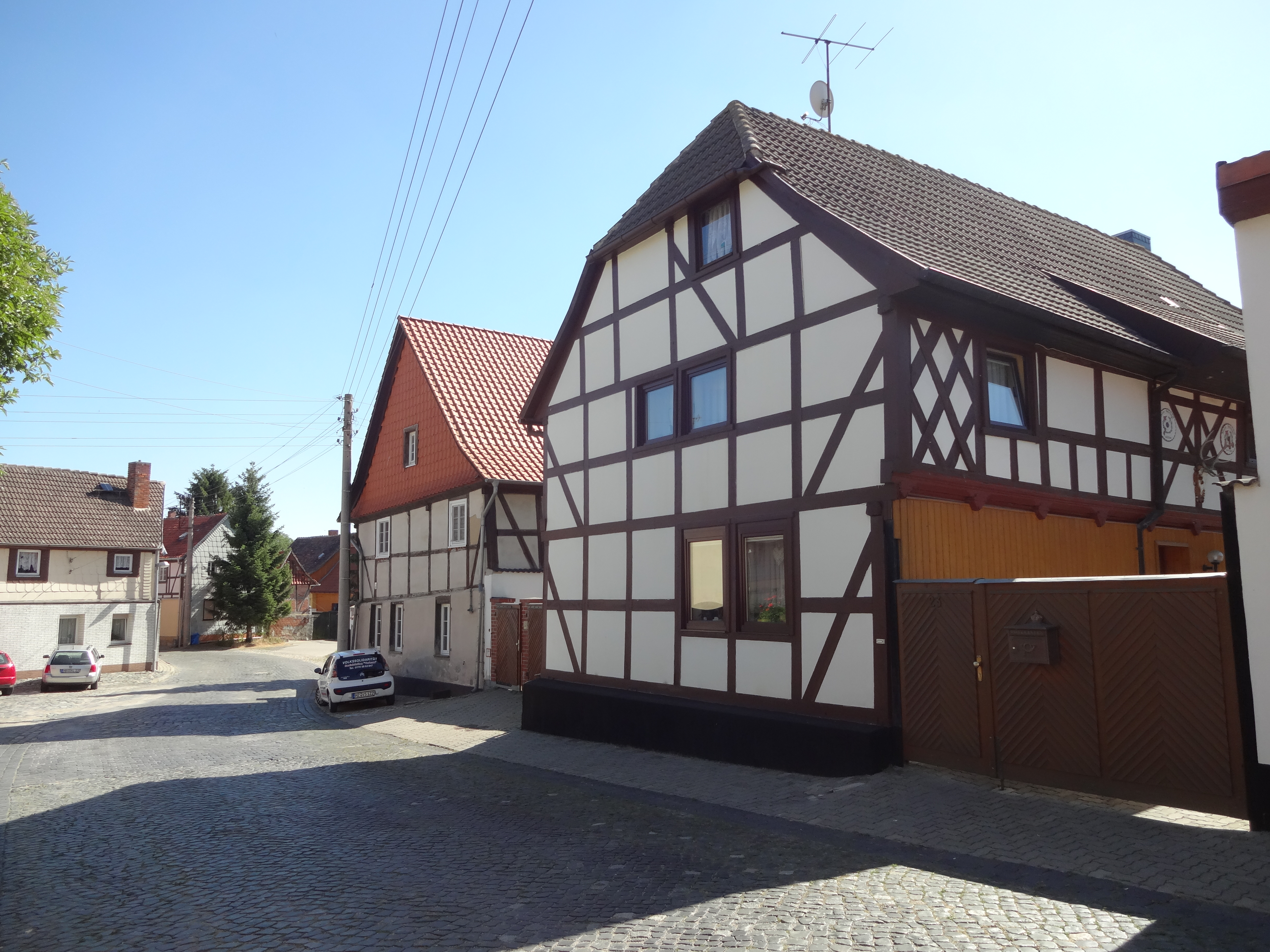 denkmalgeschütztes Wohnhaus in der Halberstädter Straße 23 in Harsleben